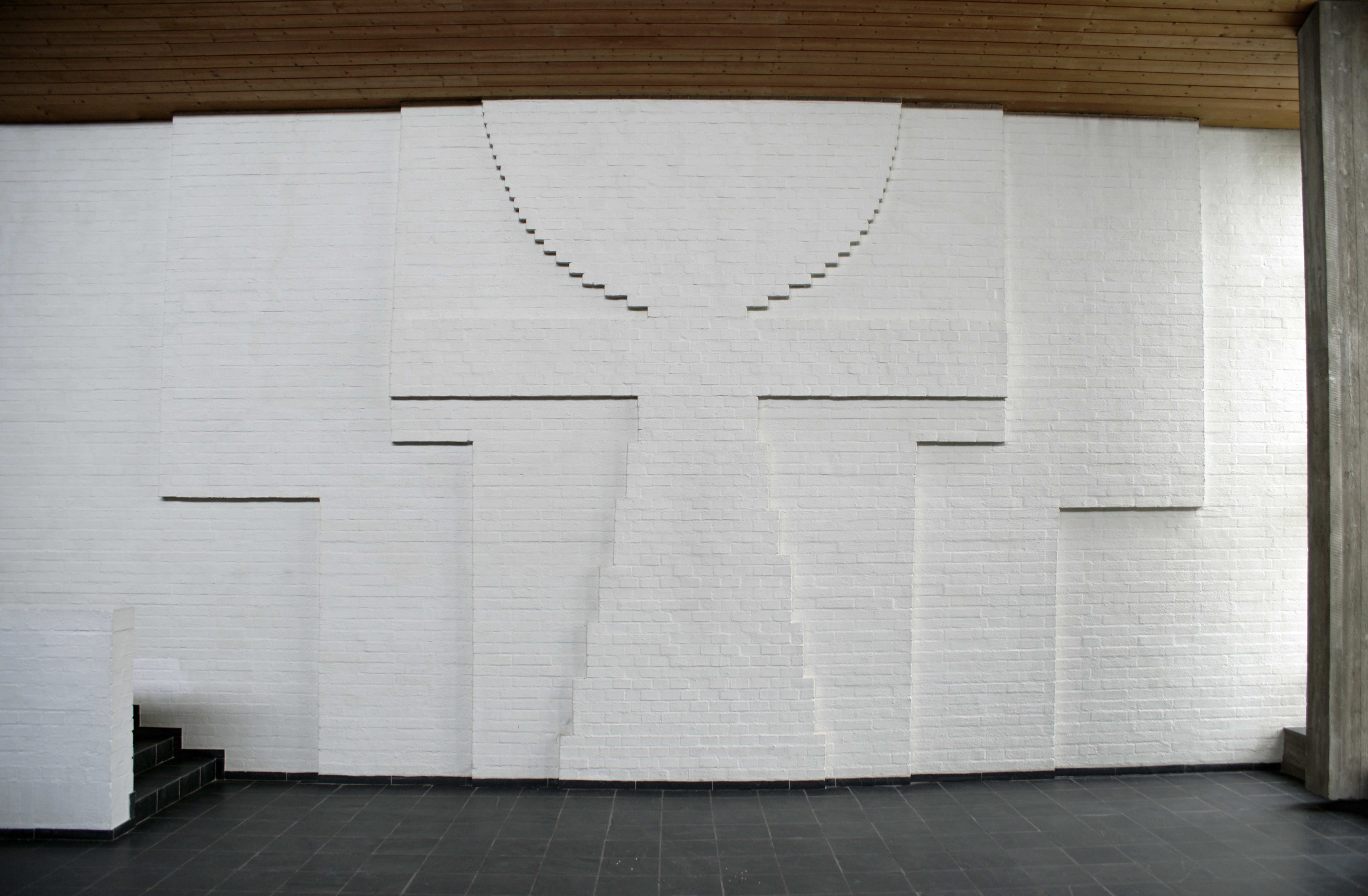 Kunst am Bau. Titus Kirche, Im Tiefen Boden 75, 4059 Basel